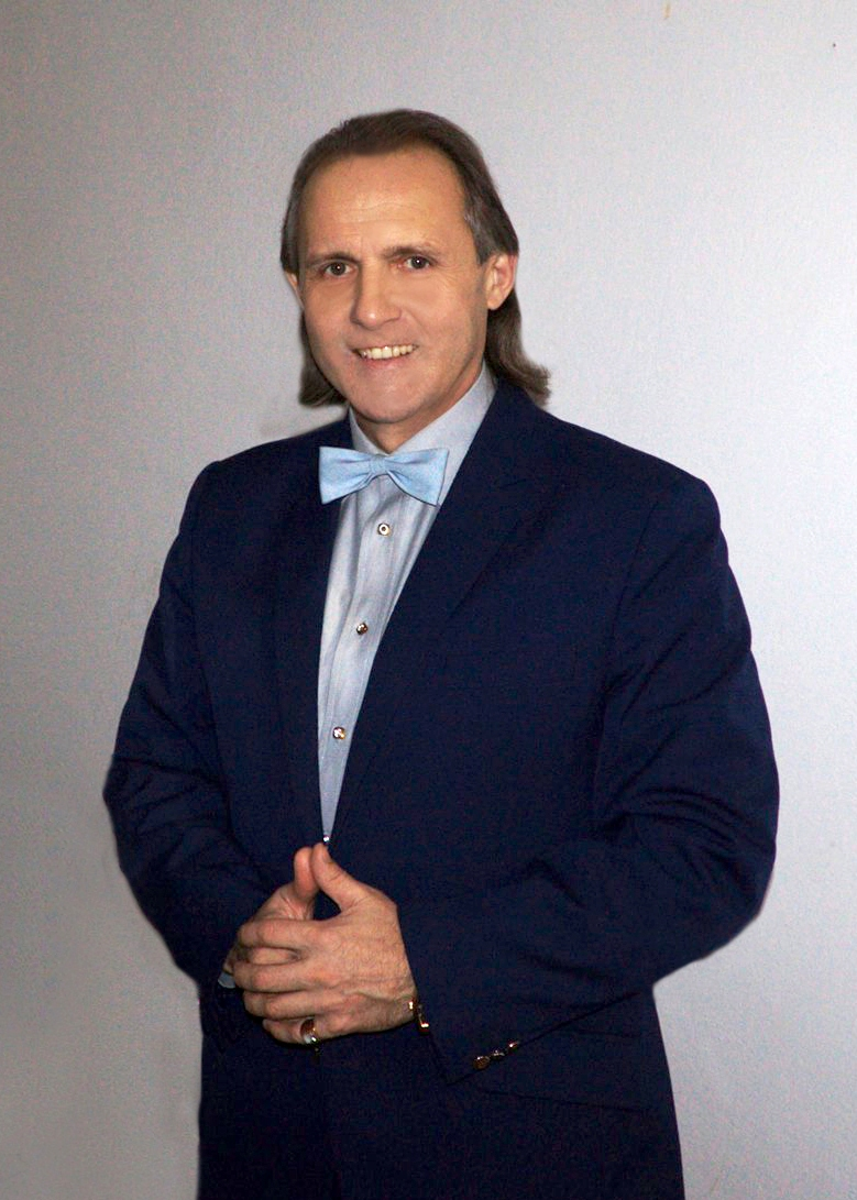 Ярослав Музика. Львів